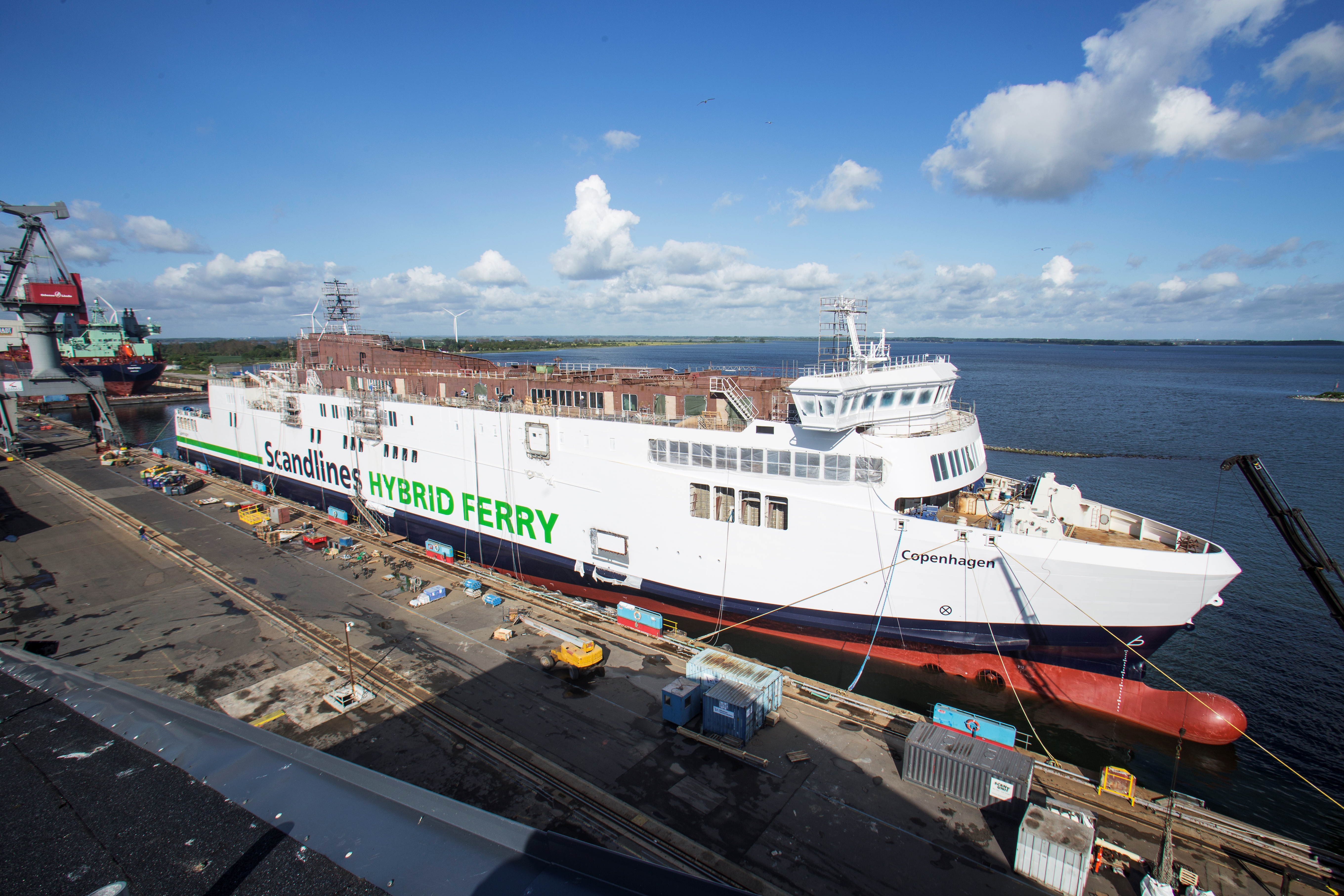 Scandlines Fähre Coopenhagen bei Bau in der Werft in Munkebo